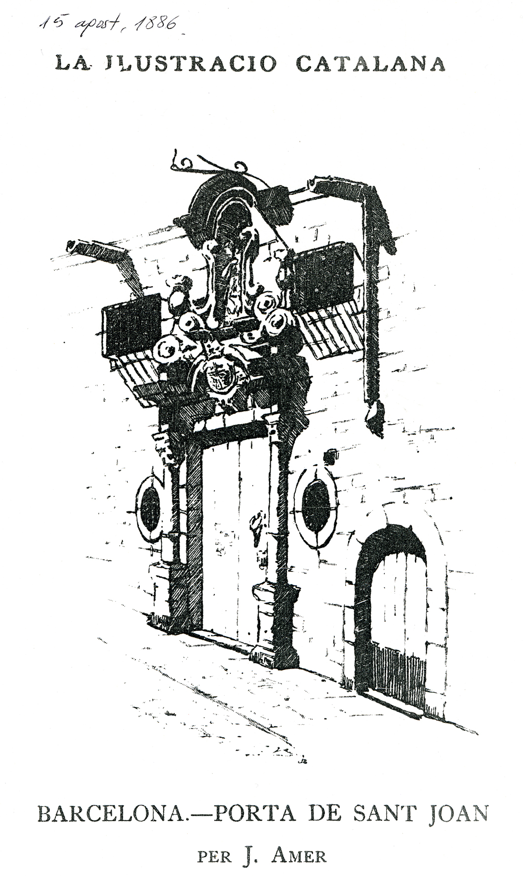 Façana de la seu de la comanda barcelonina dels hospitalers, situada a la Riera de Sant Joan. Fou enderrocada a començaments del XX en obrir la Via Laietana.